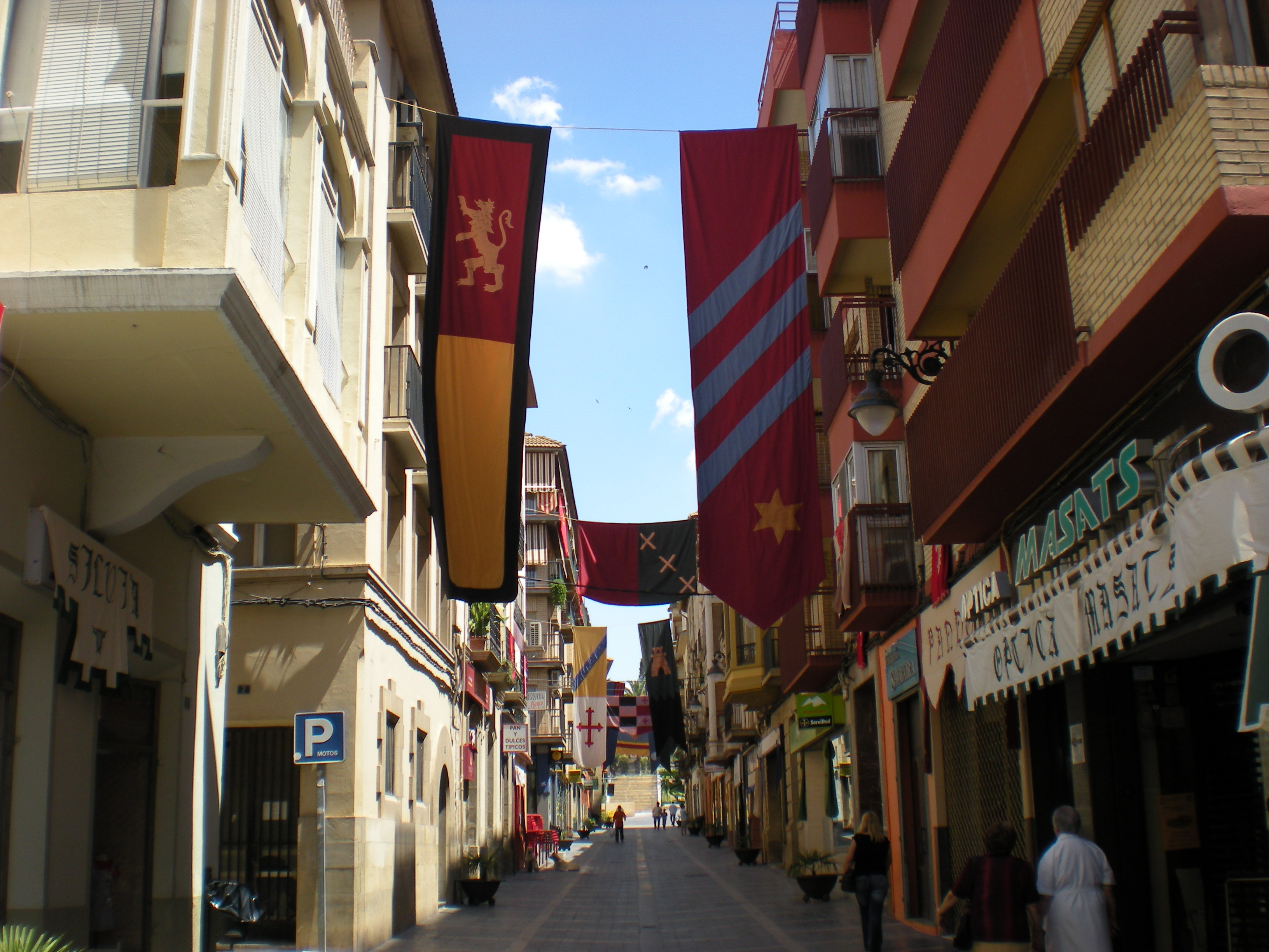 Calle Mayor de Caspe Taken by Willtron